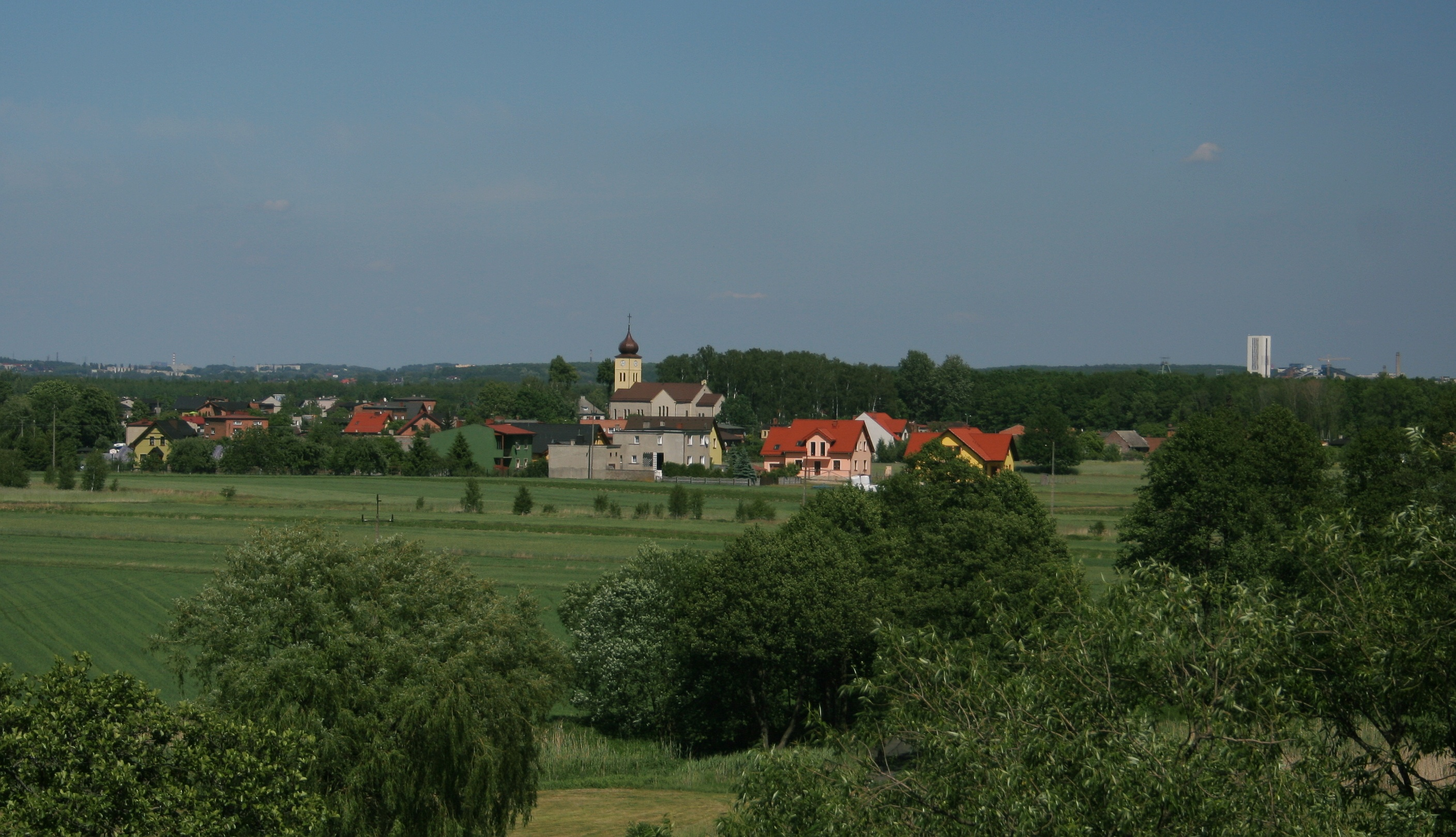 Widok z zamku w Chudowie